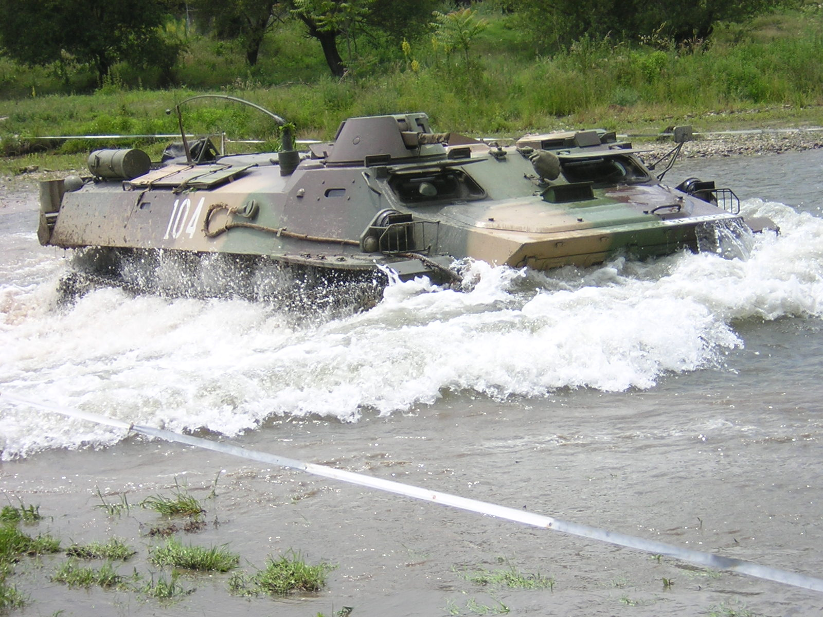 Тренировка